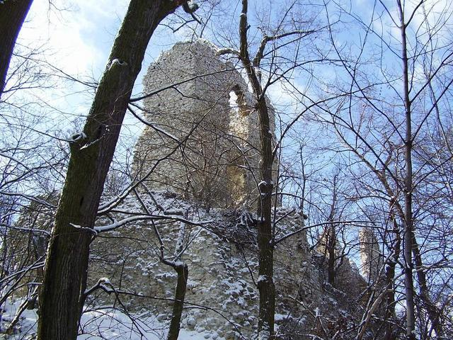 Vitany-vár, Vértessomló